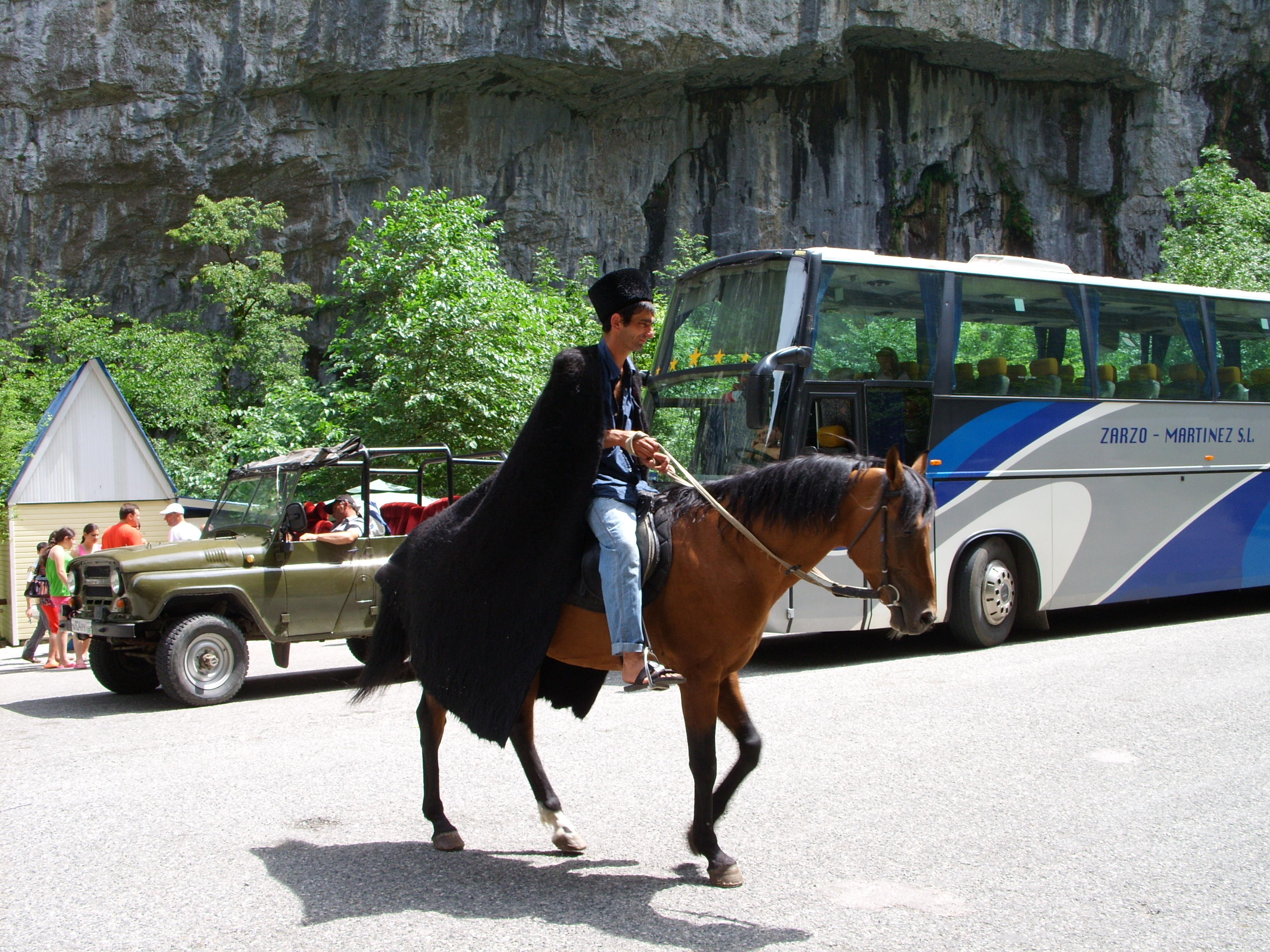 Снимок июля 2009 г. Автобусная экскурсия из Сочи